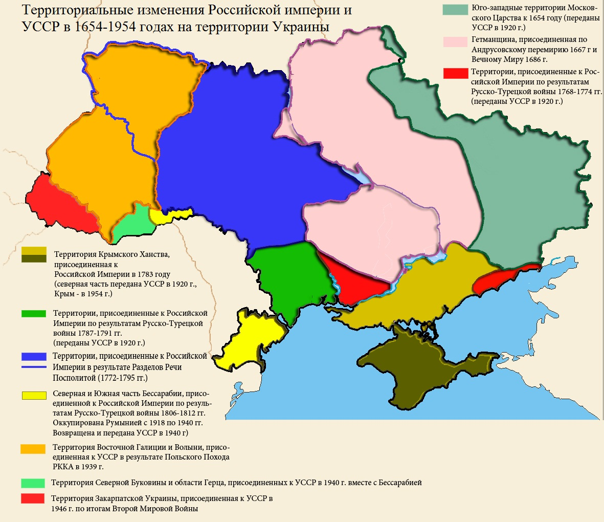 Территориальные приращения Украины